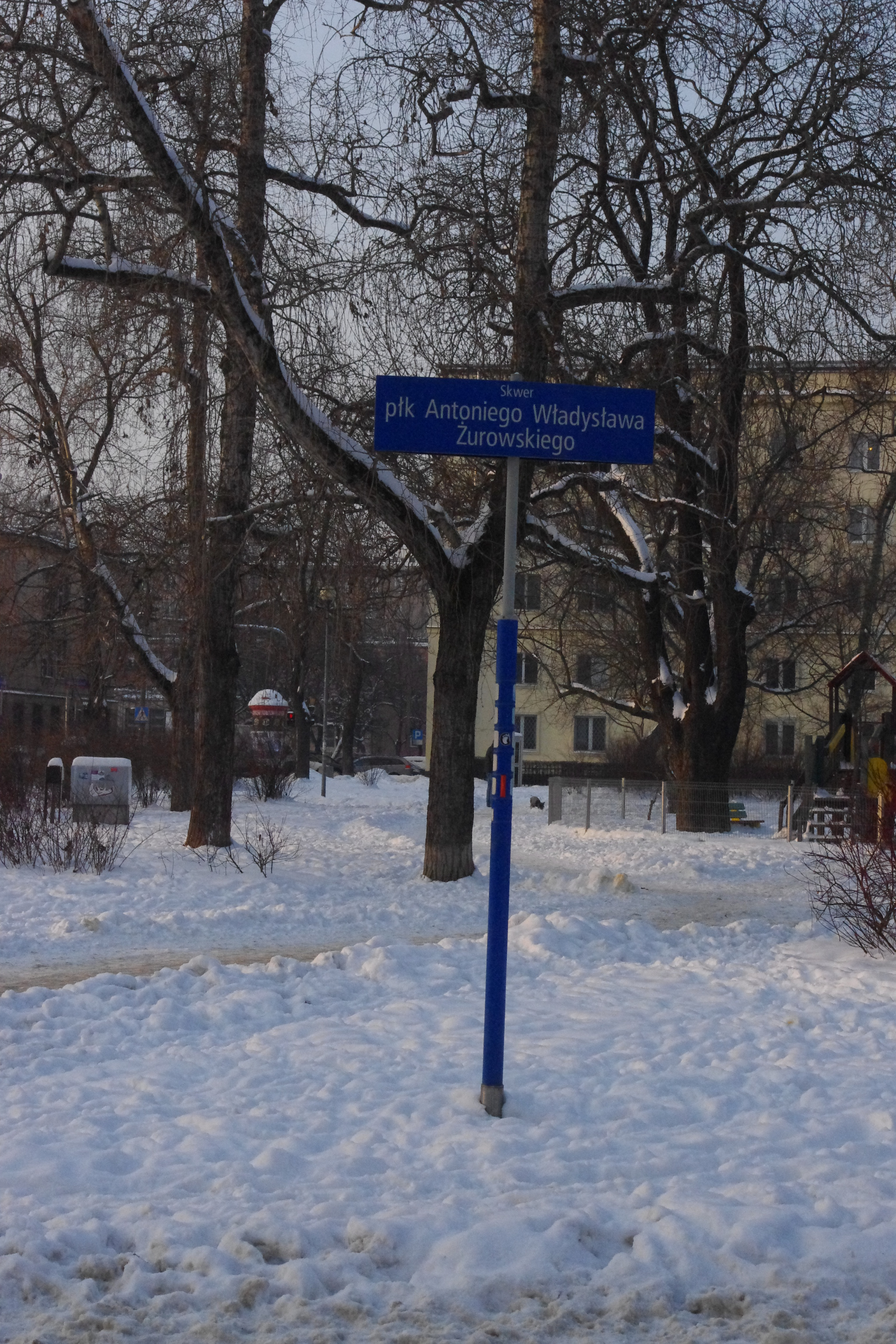 Skwer na warszawskiej Pradze upamiętniający dowódcę powstania warszawskiego na Pradze – pułkownika Antoniego Żurowskiego (Antoni Żurowski)